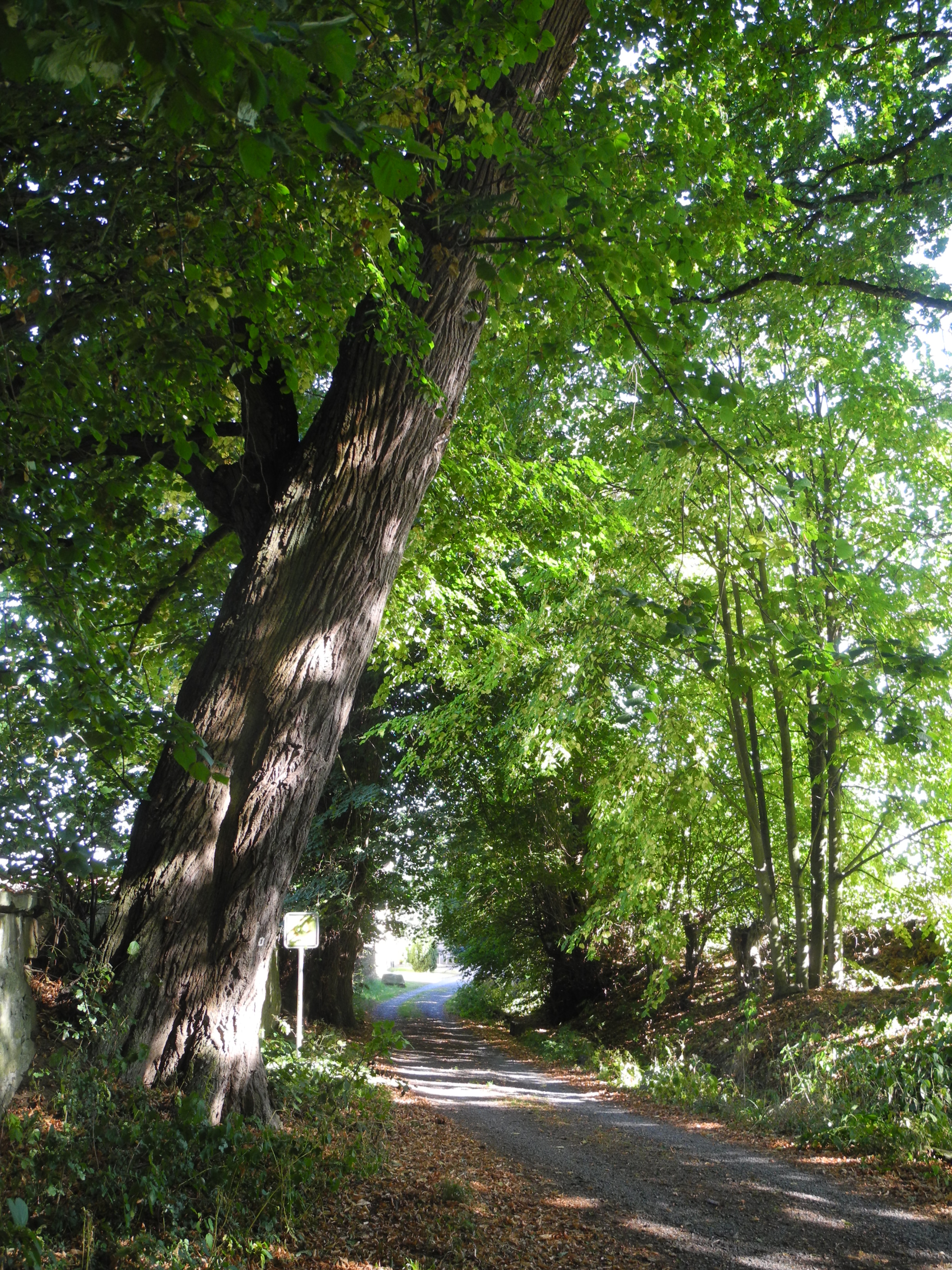 Naturdenkmal im Landkreis Kassel 6.33.016. 3 Sommerlinden (Tilia platyphyllos) in Riede am Schlosspark.